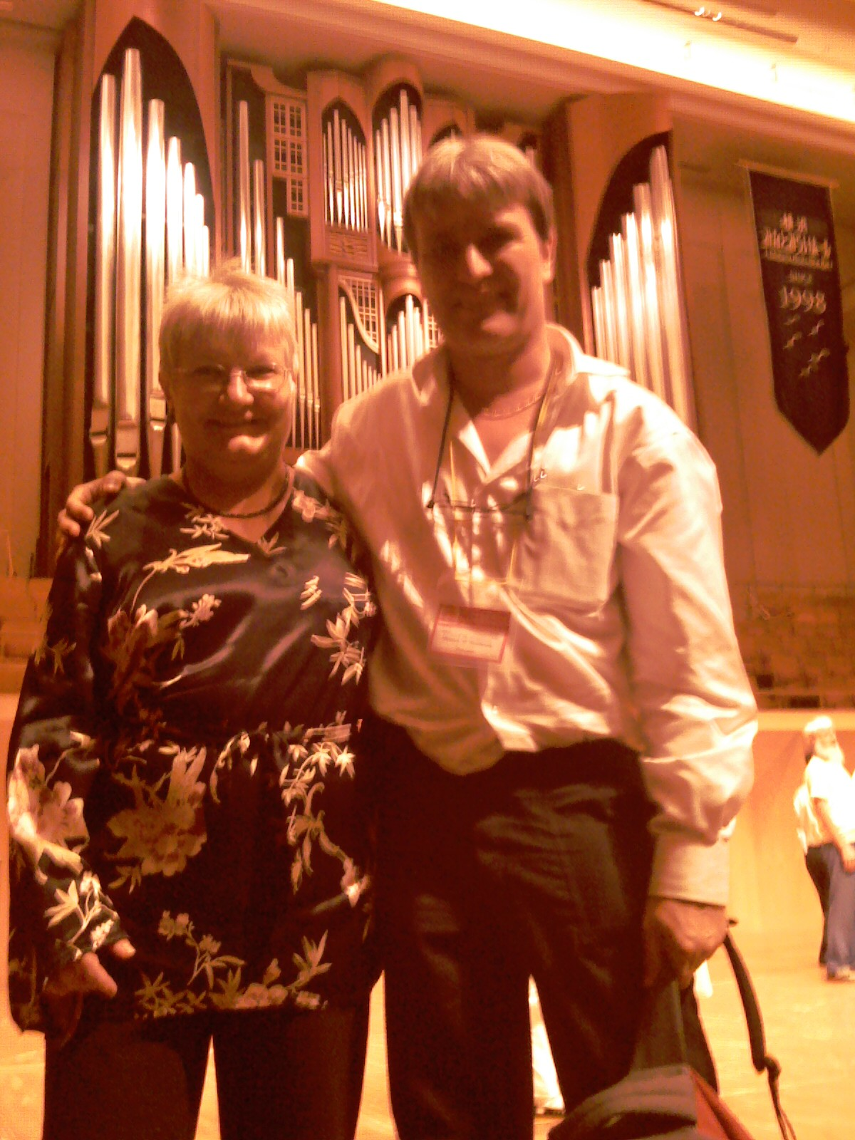 Portrait von Mireille Grosjean und Dietrich Weidmann, Co-Präsidenten der Schweizerischen Esperanto-Gesellschaft